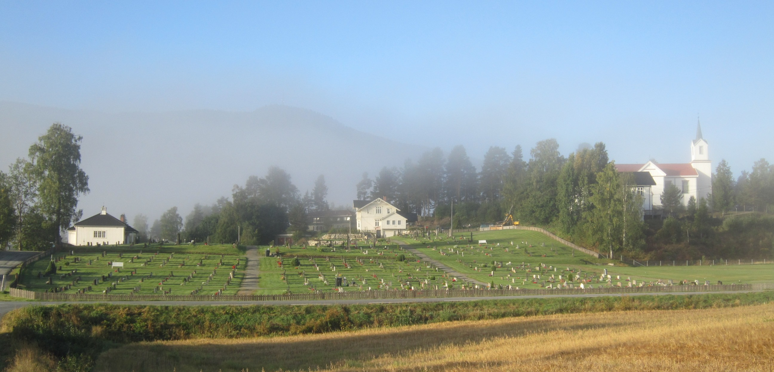 Ramstadveien (fylkesvei 133) forbi Holmen kirkegård på Prestfoss